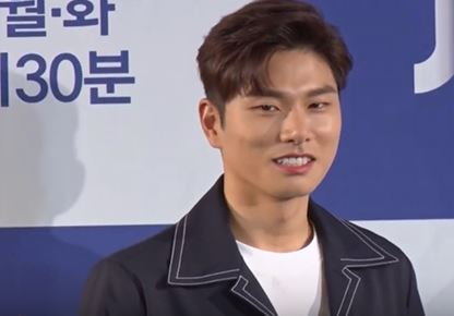 jtbc 월화 드라마 '으라차차 와이키키2' 제작발표회가 25일 오후 서울 여의도 콘래드서울에서 열렸다.